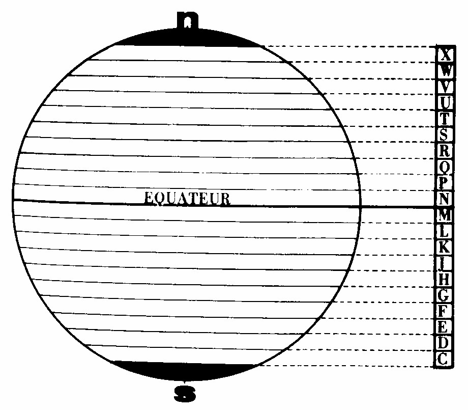 Banden